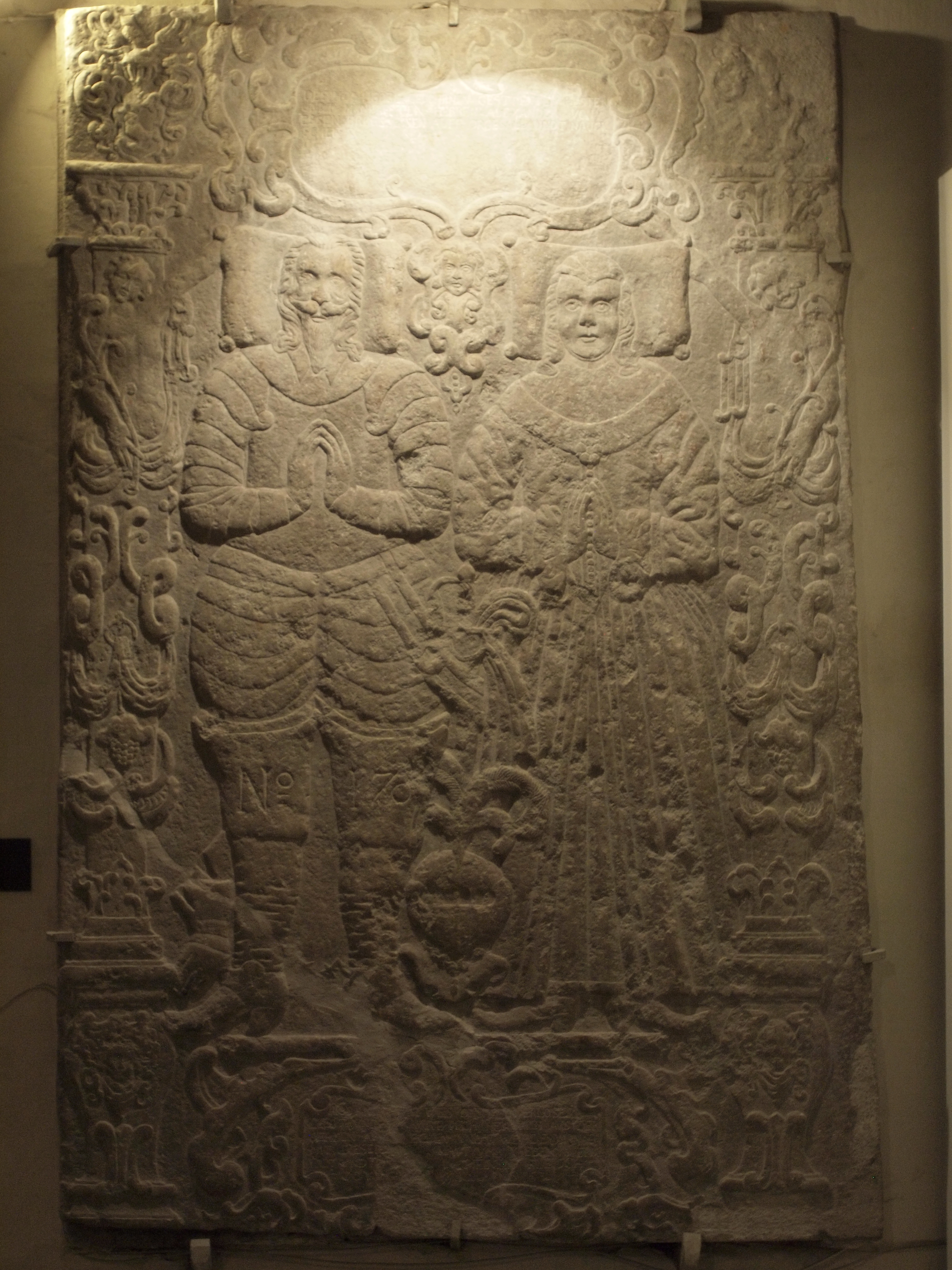 Eestimaa aadliku ja Rootsi ohvitseri Alexander von Esseni ja tema abikaasa Magdalena von Ungerni hauaplaat Niguliste kirikus